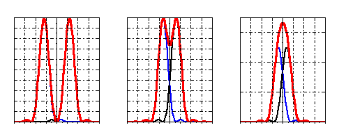 Illustration du critère de Rayleigh pour la formation des images. Domaine public